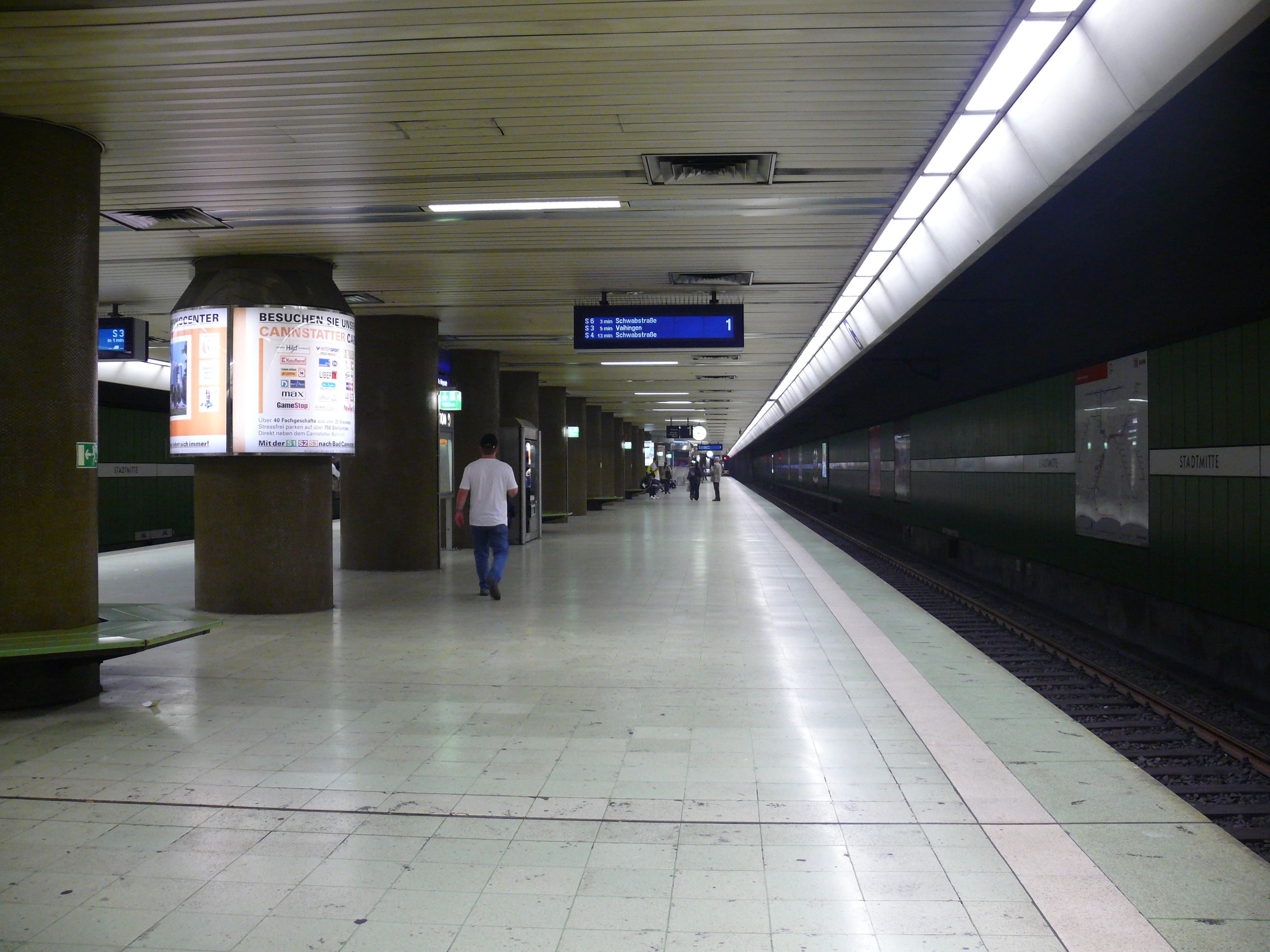 Der unterirdische S-Bahnhof Stadtmitte in Stuttgart.